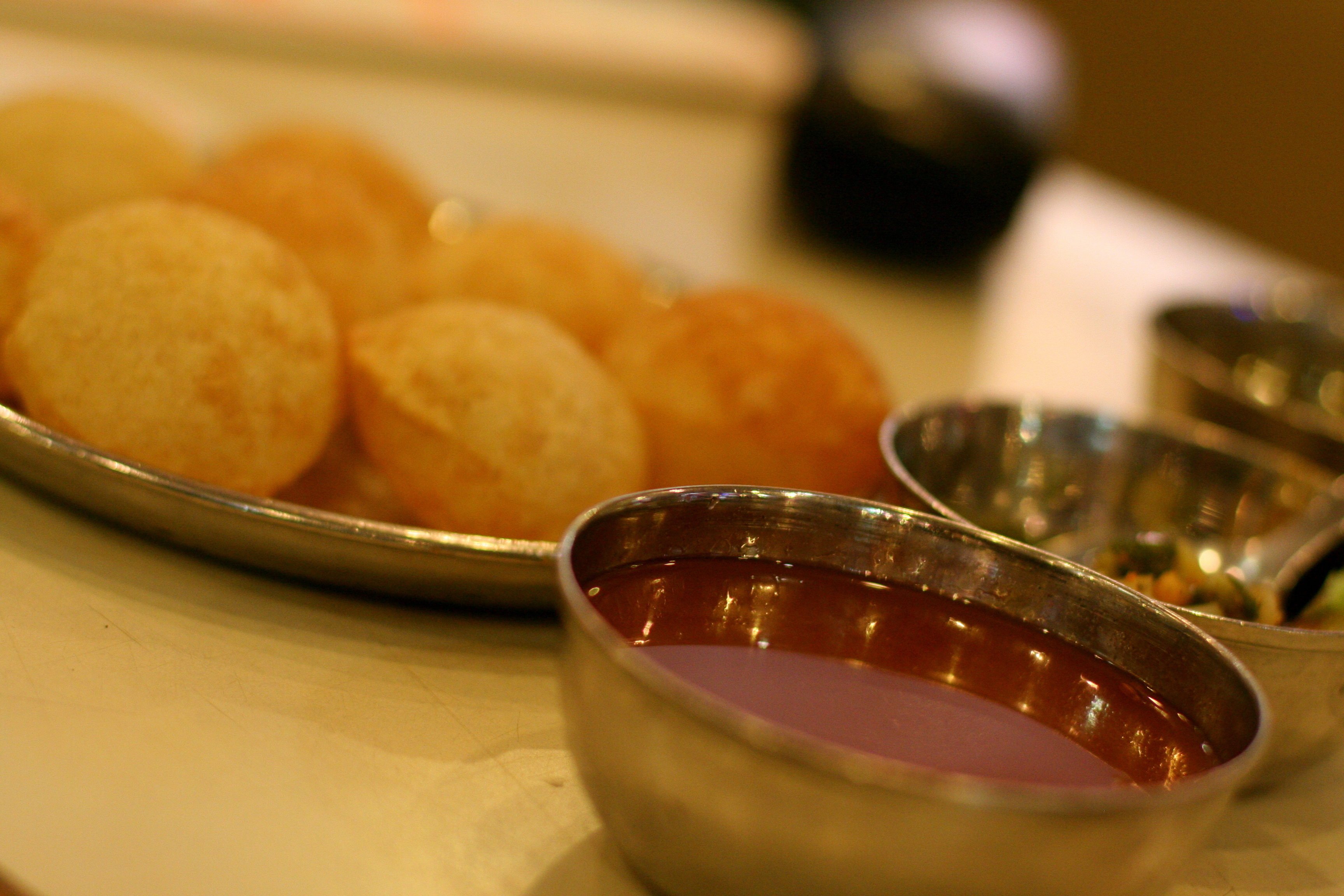 Indian cuisine-Panipuri